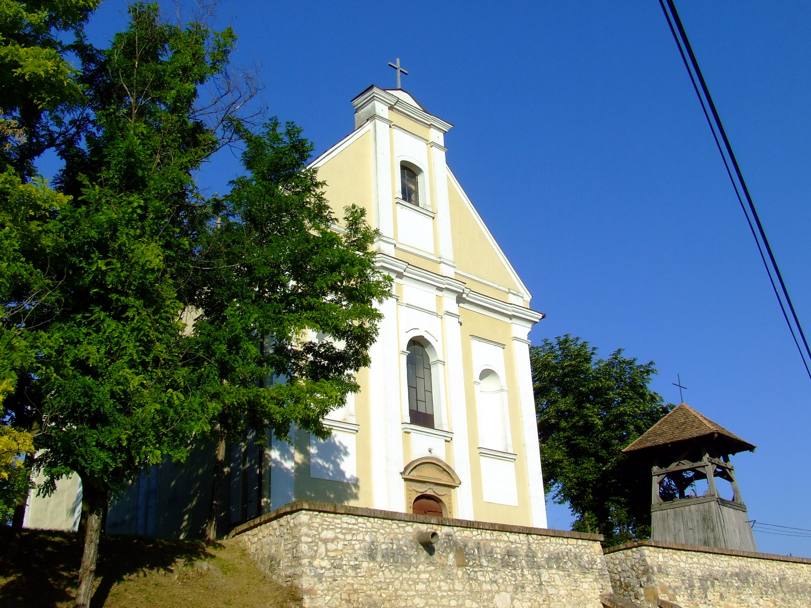 Az erzsébeti (Baranya megye) Árpád-házi Szent Erzsébet-templom. 1787-ben épült barokk stílusban